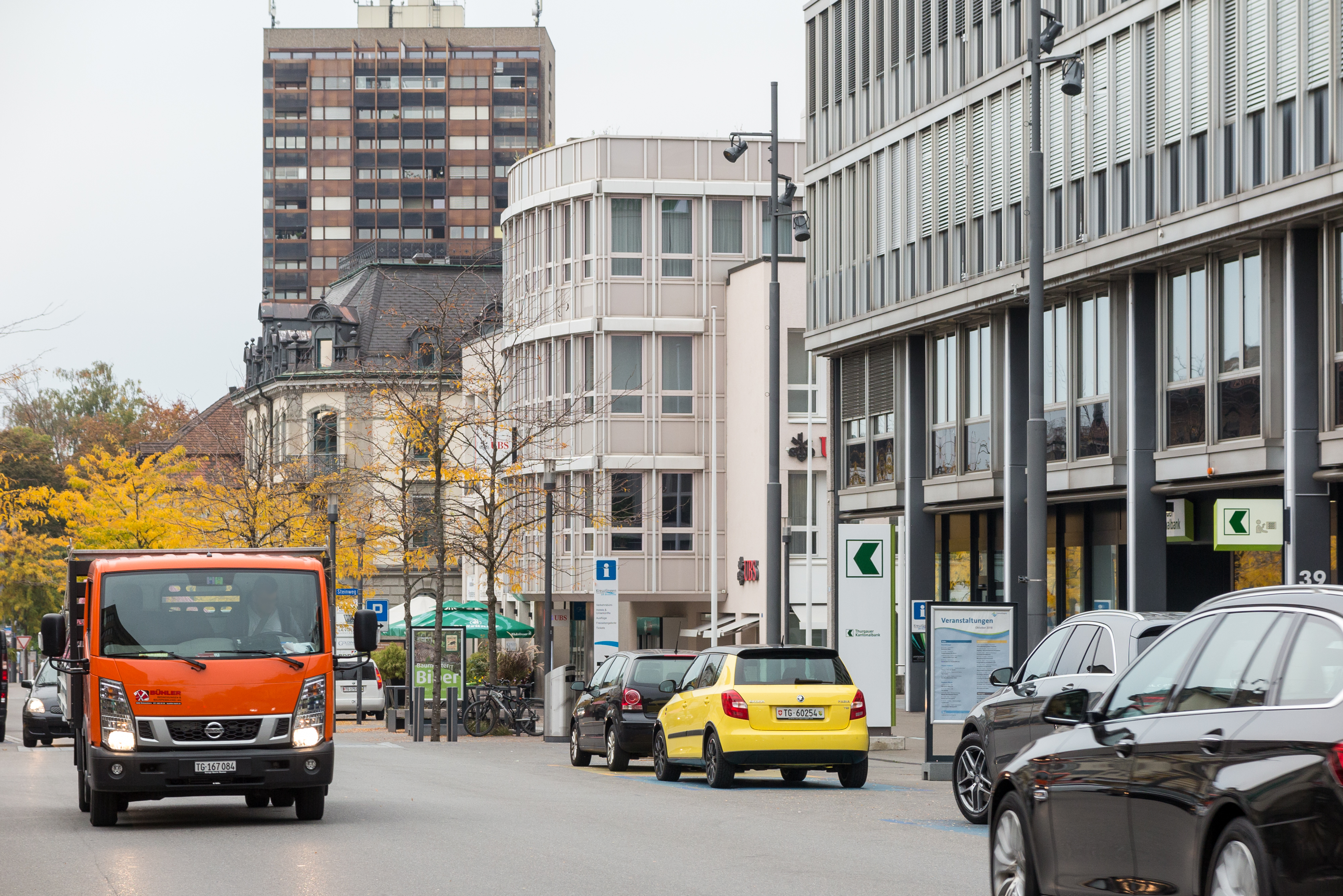 Hauptstrasse in Kreuzlingen